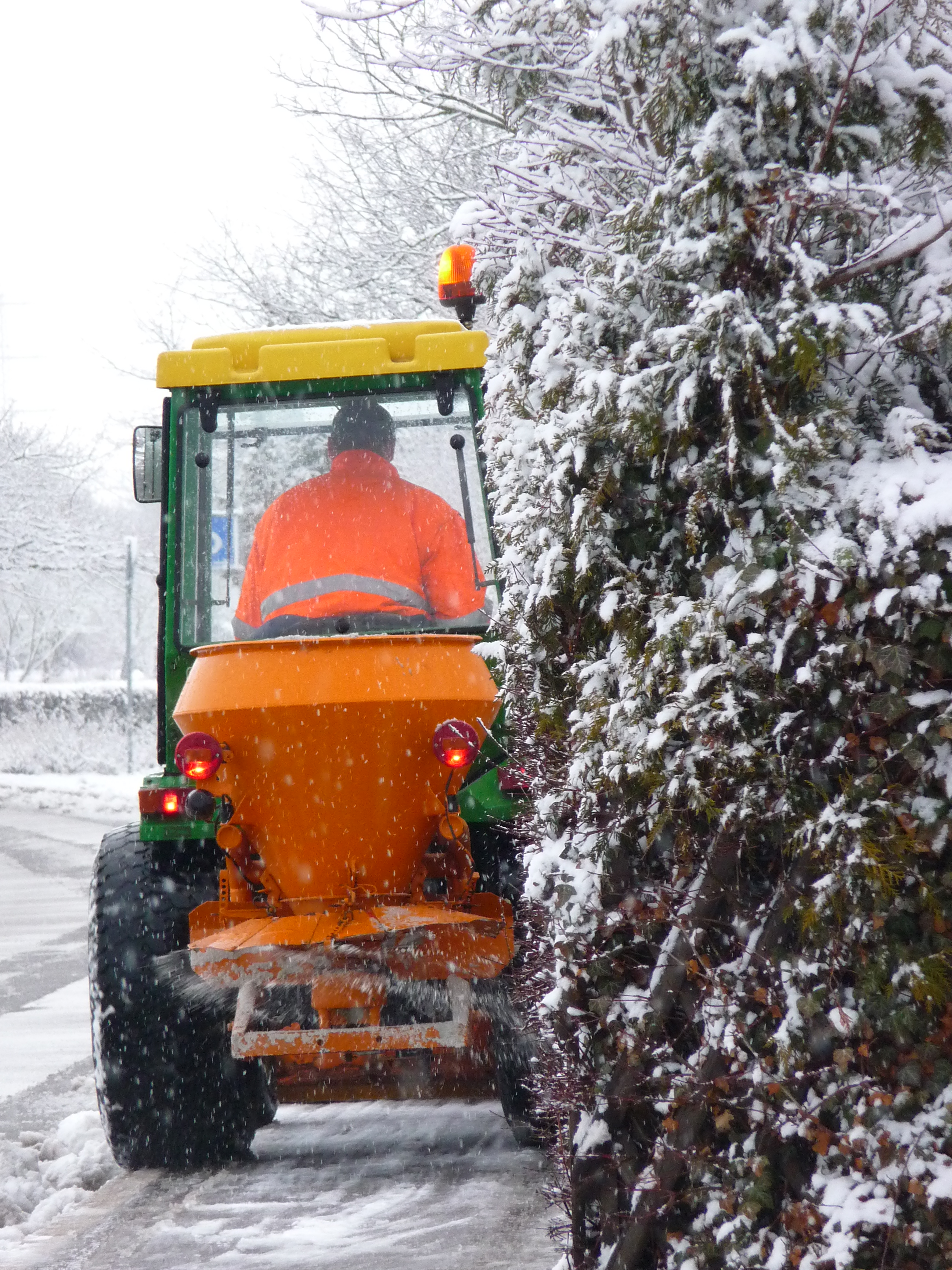 Traktor, umgerüstet zum Winterdiensteinsatz; hier: Vorrichtung zur Verteilung von Spilt und Streusalz, fotografiert in einer Gemeinde in Nordbaden (Baden-Württemberg, Deutschland)